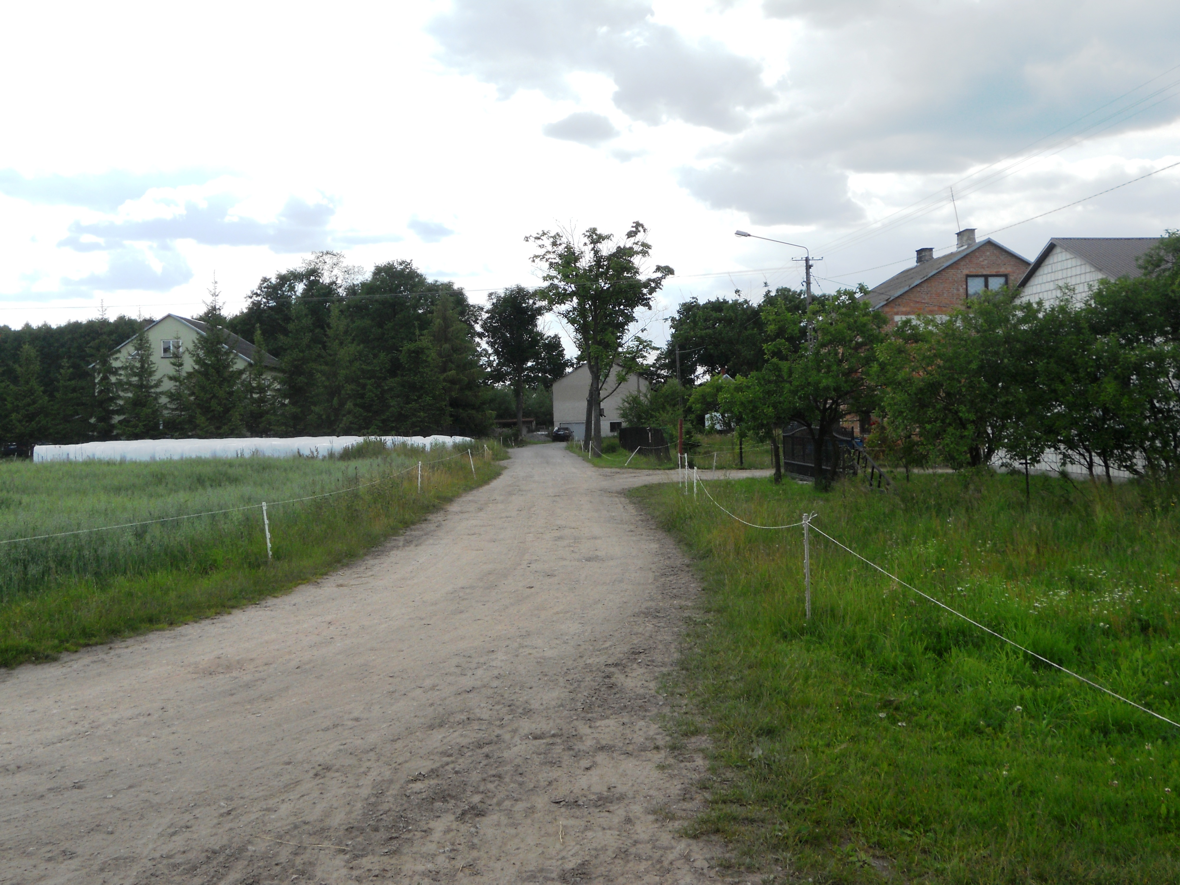 Miejscowość w gminie Mińsk Mazowiecki